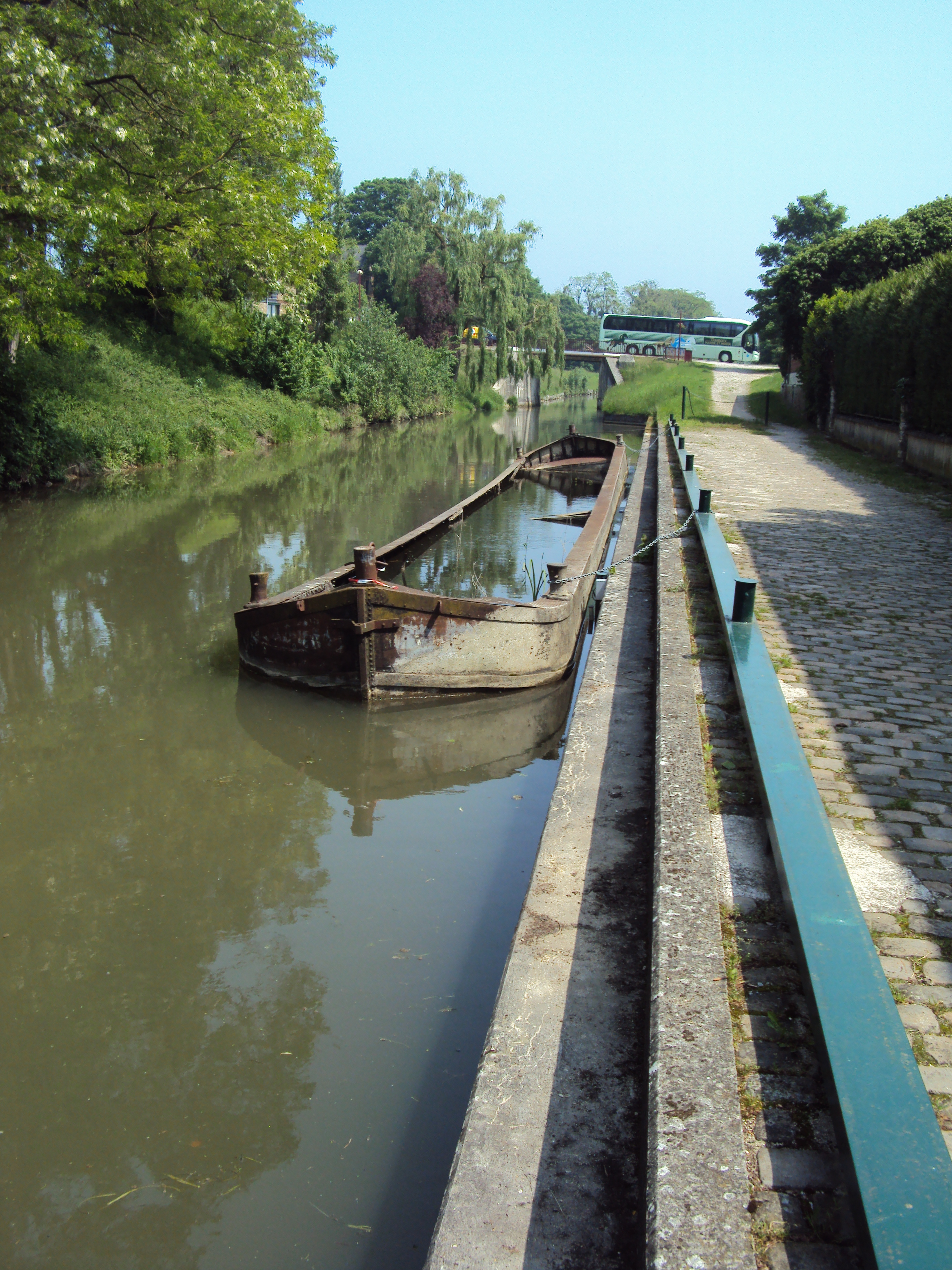 Une epave de flute a Lizy-sur-Ourcq sur le canal de l'Ourcq. A l’arrière plan, le pont de la D401.